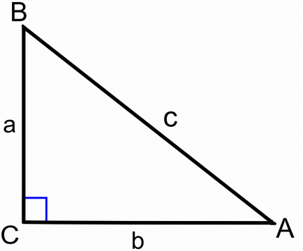 משולש ישר זווית. נוצר על ידי, ומשוחרר לציבור הרחב (PUBLIC DOMAIN). GNU 22:06, 10 יולי 2005 (UTC)